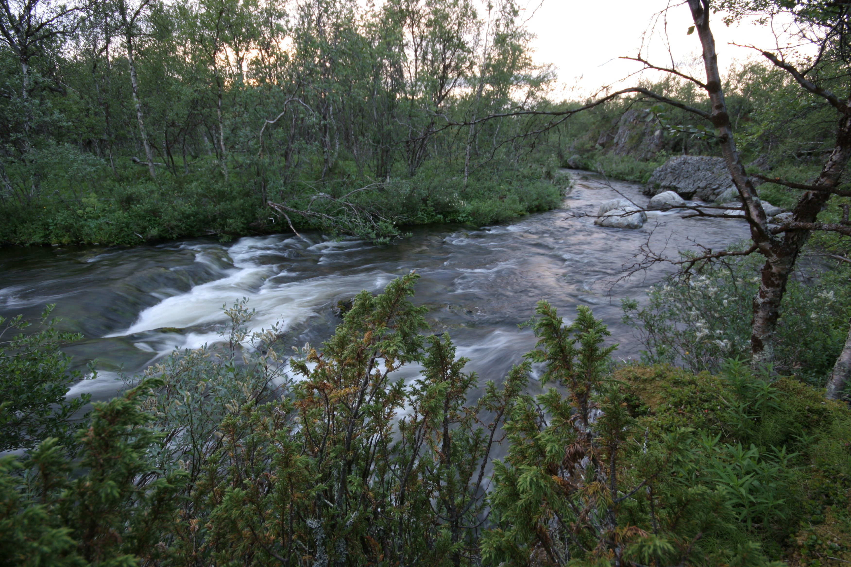 Stiipanjåkka river at Spadaluobbal